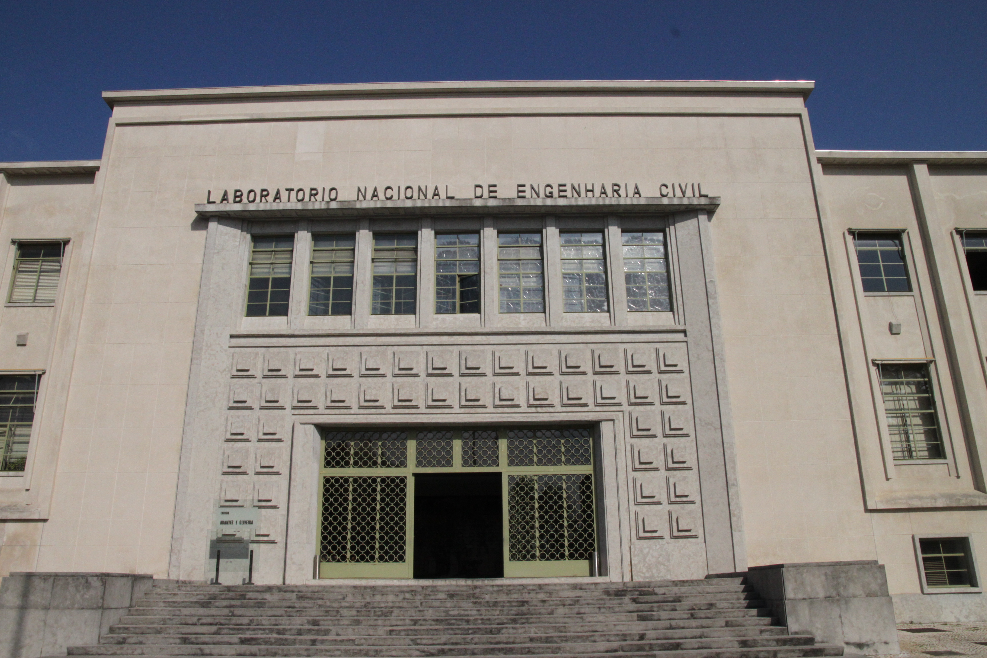 Laboratório Nacional de Engenharia Civil / LNEC This file was uploaded for Wiki Loves Monuments in Portugal with the unique identifier 97007087.